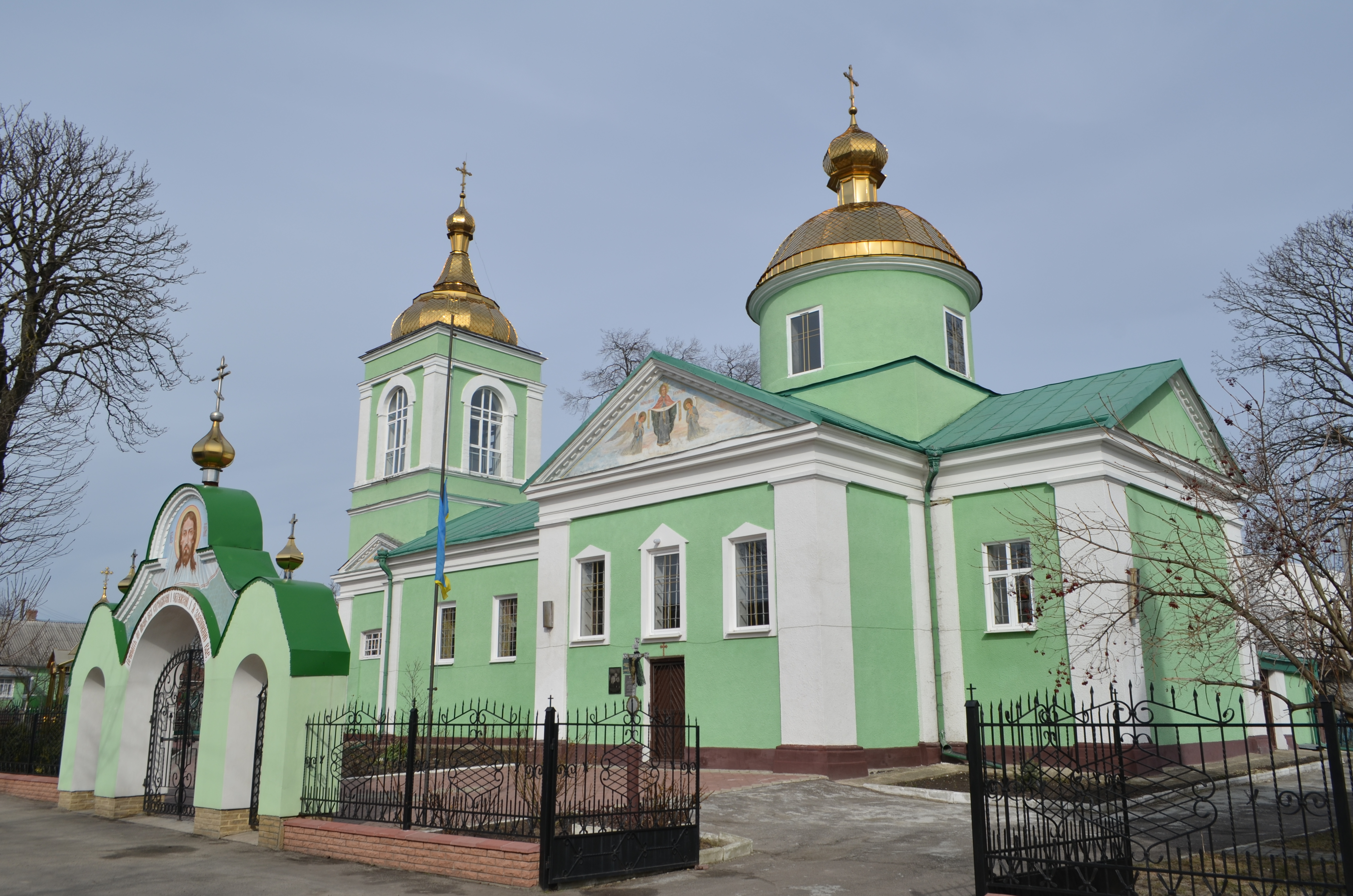 Ансамбль церкви Вознесіння Господнього, Горохів, вул. Гетьманська, 9а